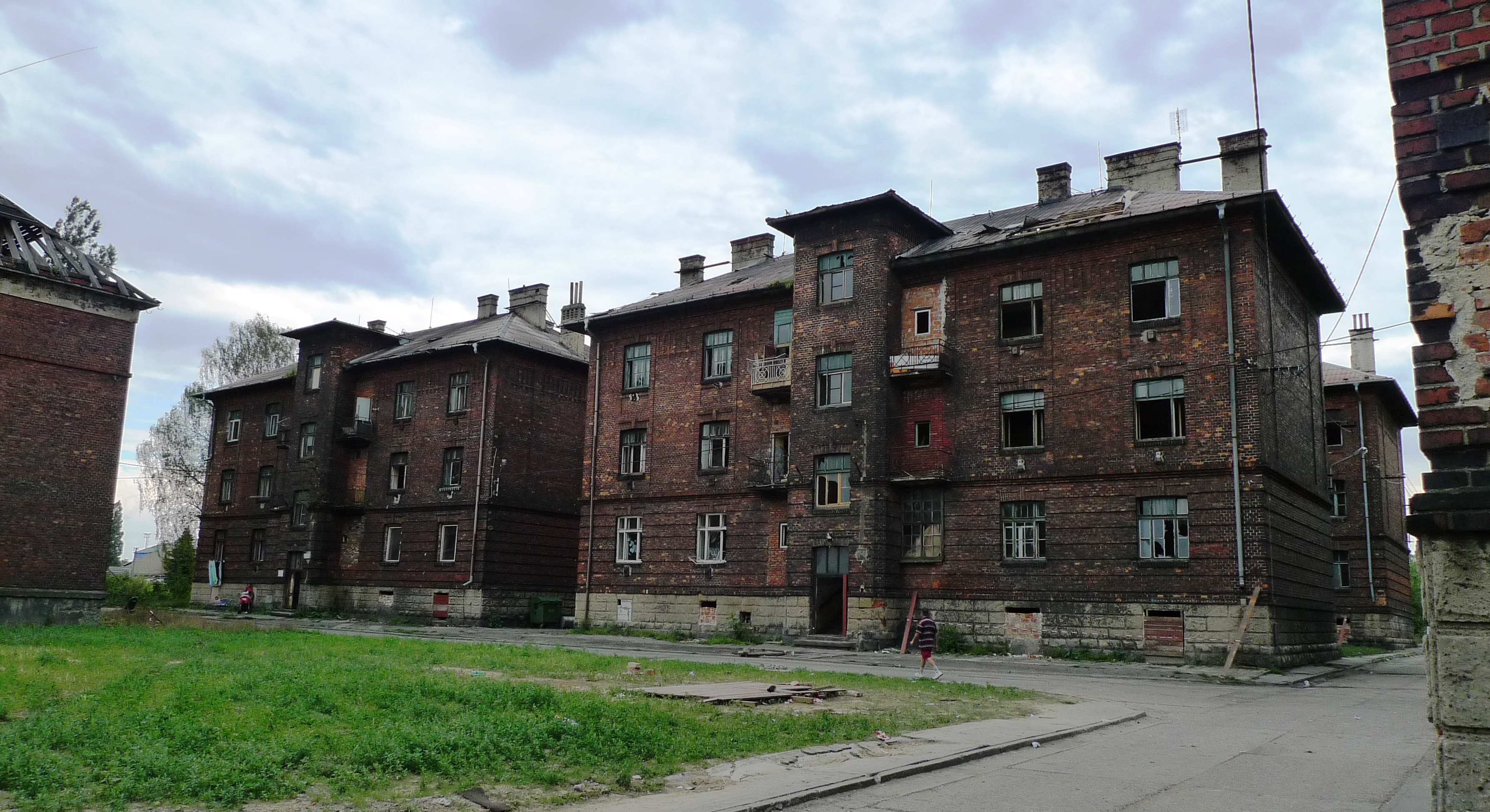 Domy na ulici Přednádraží v Ostravě.